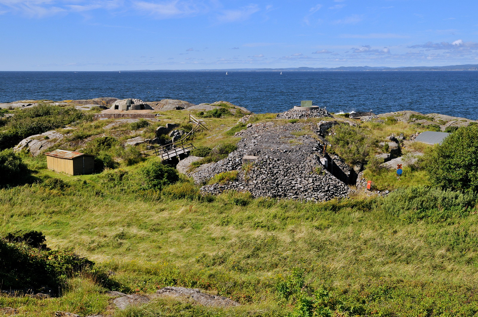 Oversiktsbilde i retning Jomfruland